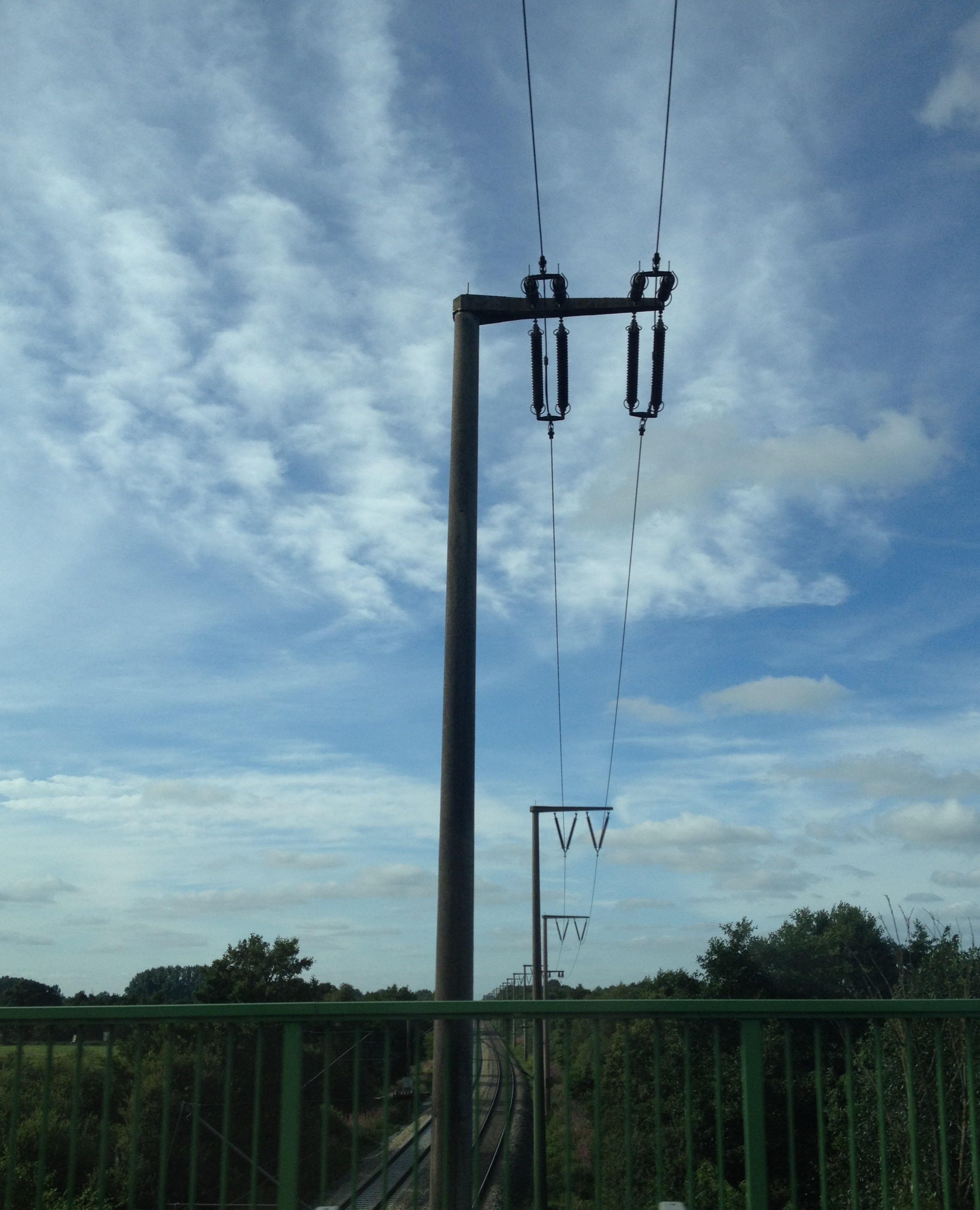 110-kV-Bahnstromleitung Leer-Emden, an den Oberleitungsmasten aufgehängt; Leer (Ostfriesland)